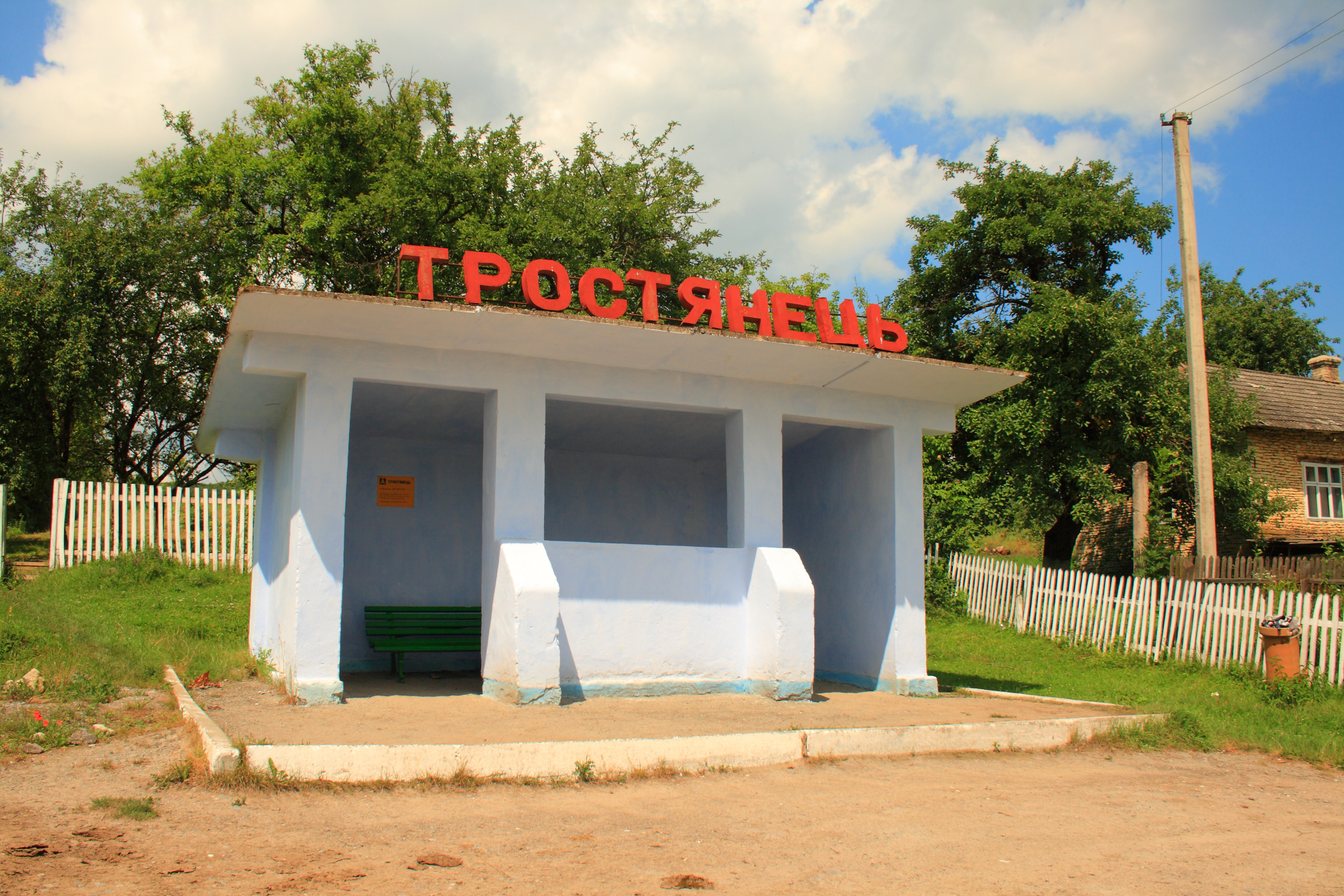 Автобусна зупинка в селі Тростянець Бережанського району Тернопільської області.